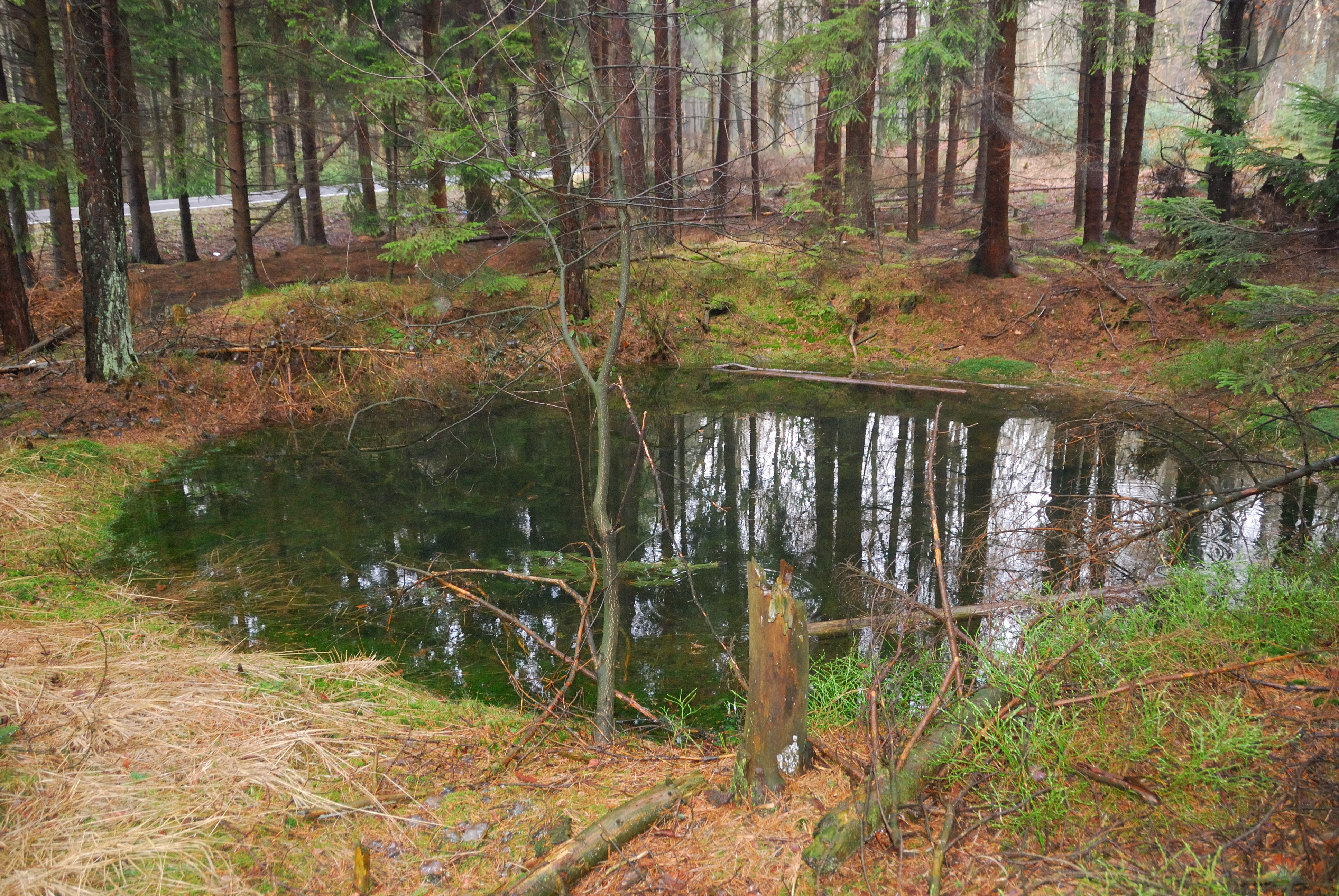 Bombentrichter bei einer V1-Stellung bei Kuchhausen